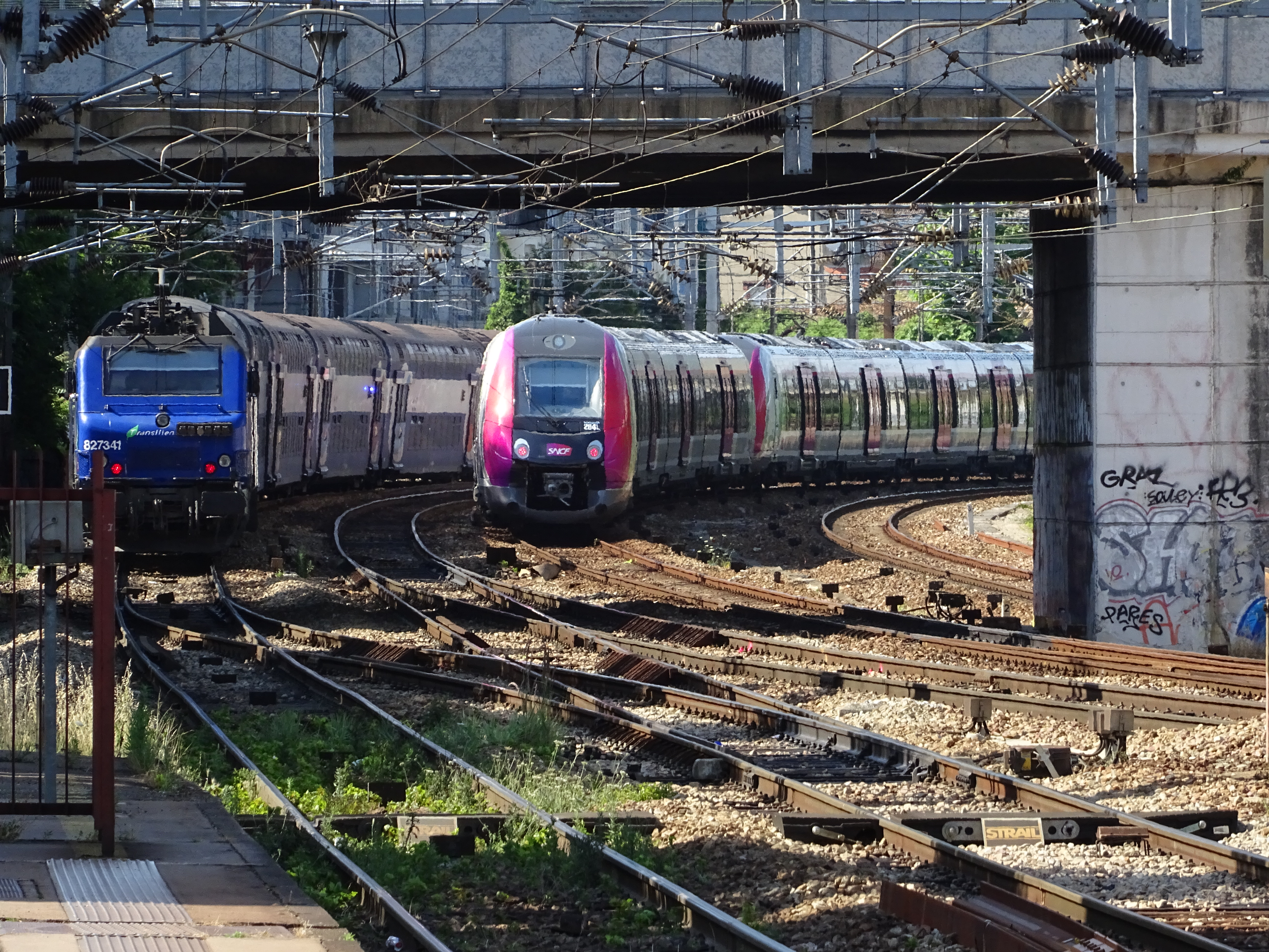 Francilien et VB2N en sortie de gare d'Argenteuil.